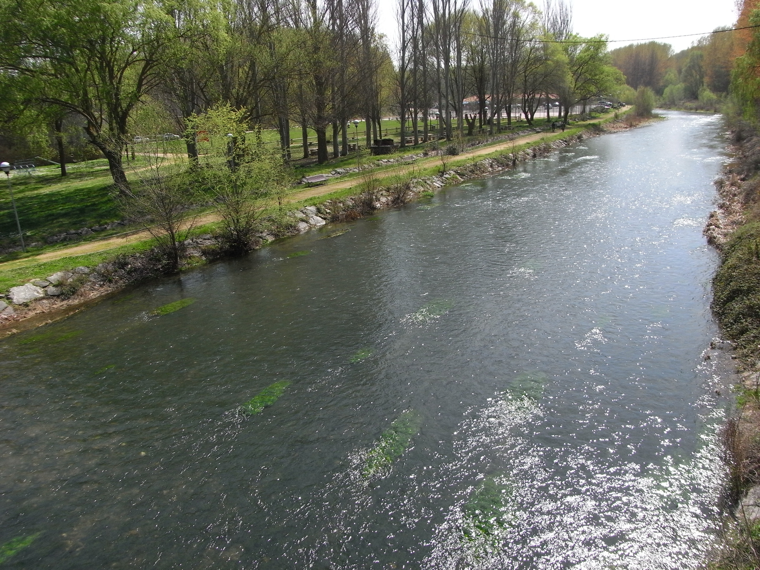 Río Tirón a su paso por Anguciana tomada desde el puente de piedra